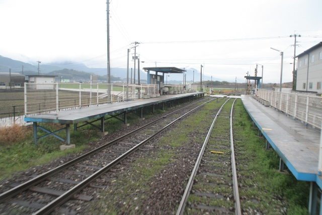 上金田駅